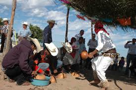 Indígenas mayos y danzante de la Danza del Venado